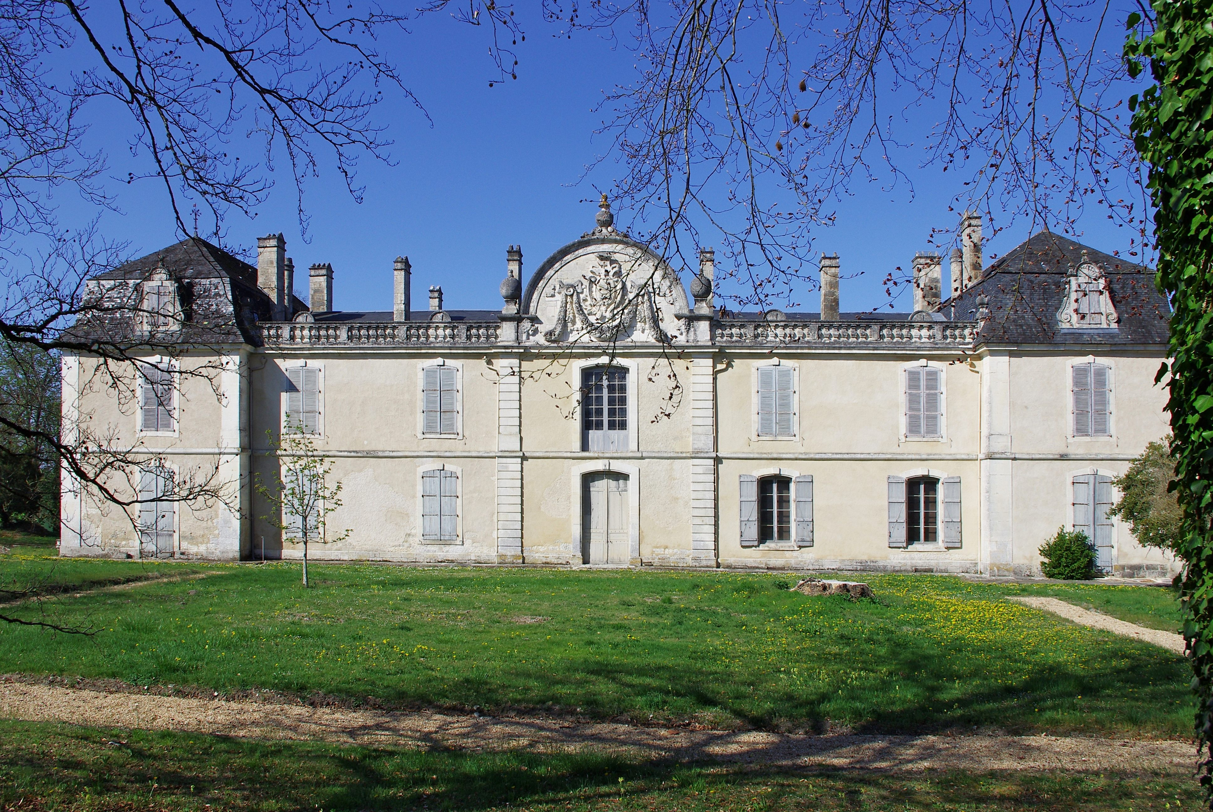 Façade est du château de Vendoire, Dordogne, France.